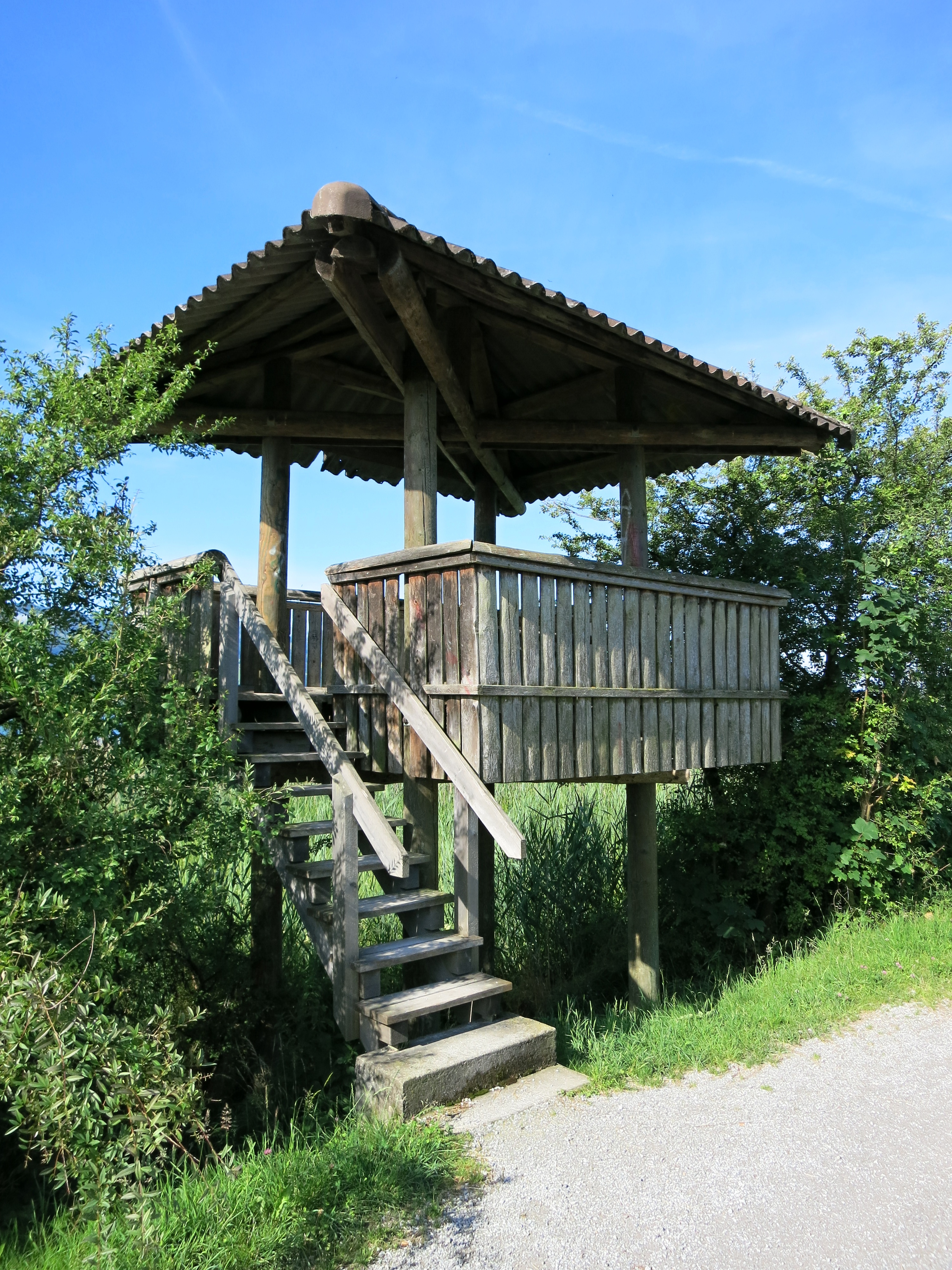 Zürichseekänzeli